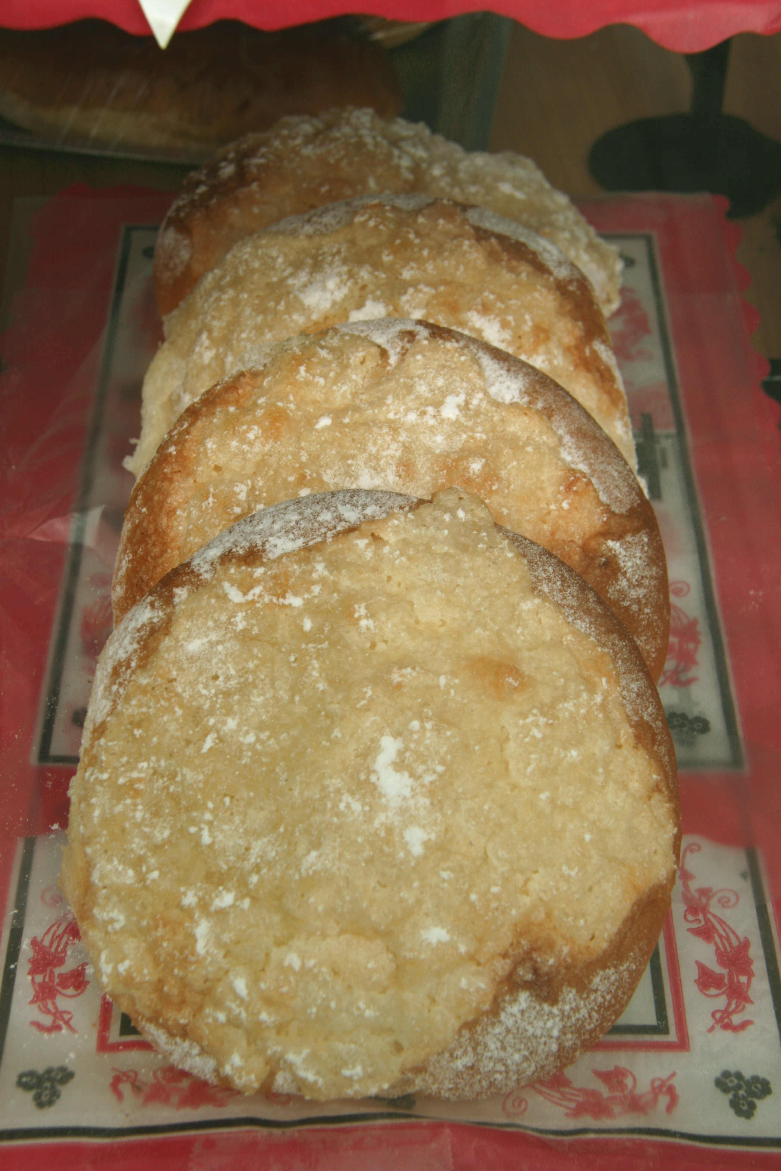 Cristinas